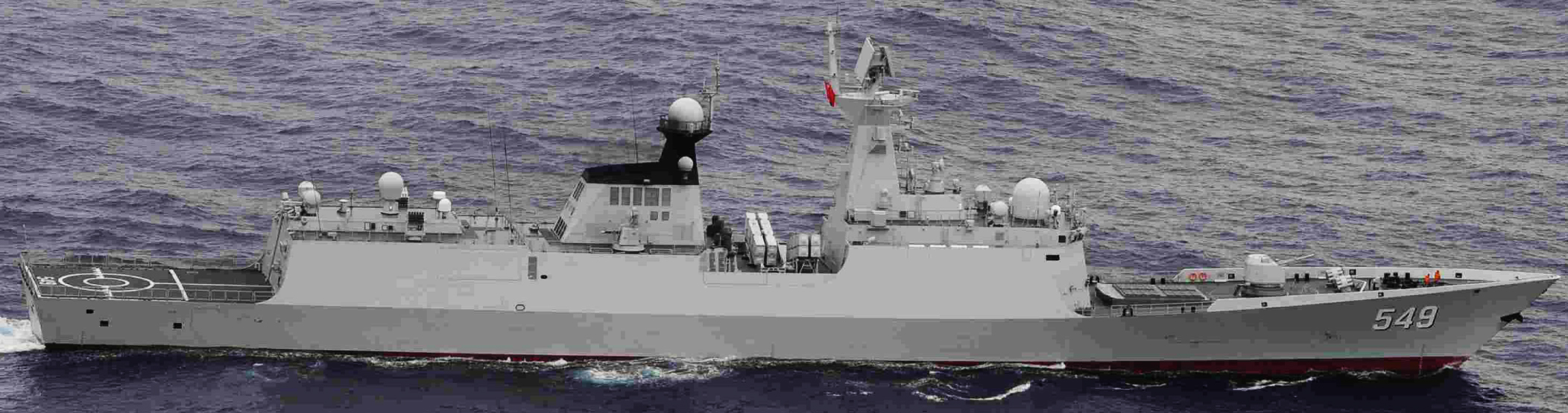 ７月１８日（土）午前１０時半頃から午後４時半頃にかけて、海上自衛隊第５航空群所属「Ｐ－３Ｃ」（那覇）及び第１２護衛隊所属「せんだい」（呉）が、以下のとおり、宮古島の北東約１１０ｋｍの海域を東シナ海から太平洋に向けて南東進する中国艦艇３隻を確認した。午前１０時半頃、ジャンカイII級フリゲート１隻。